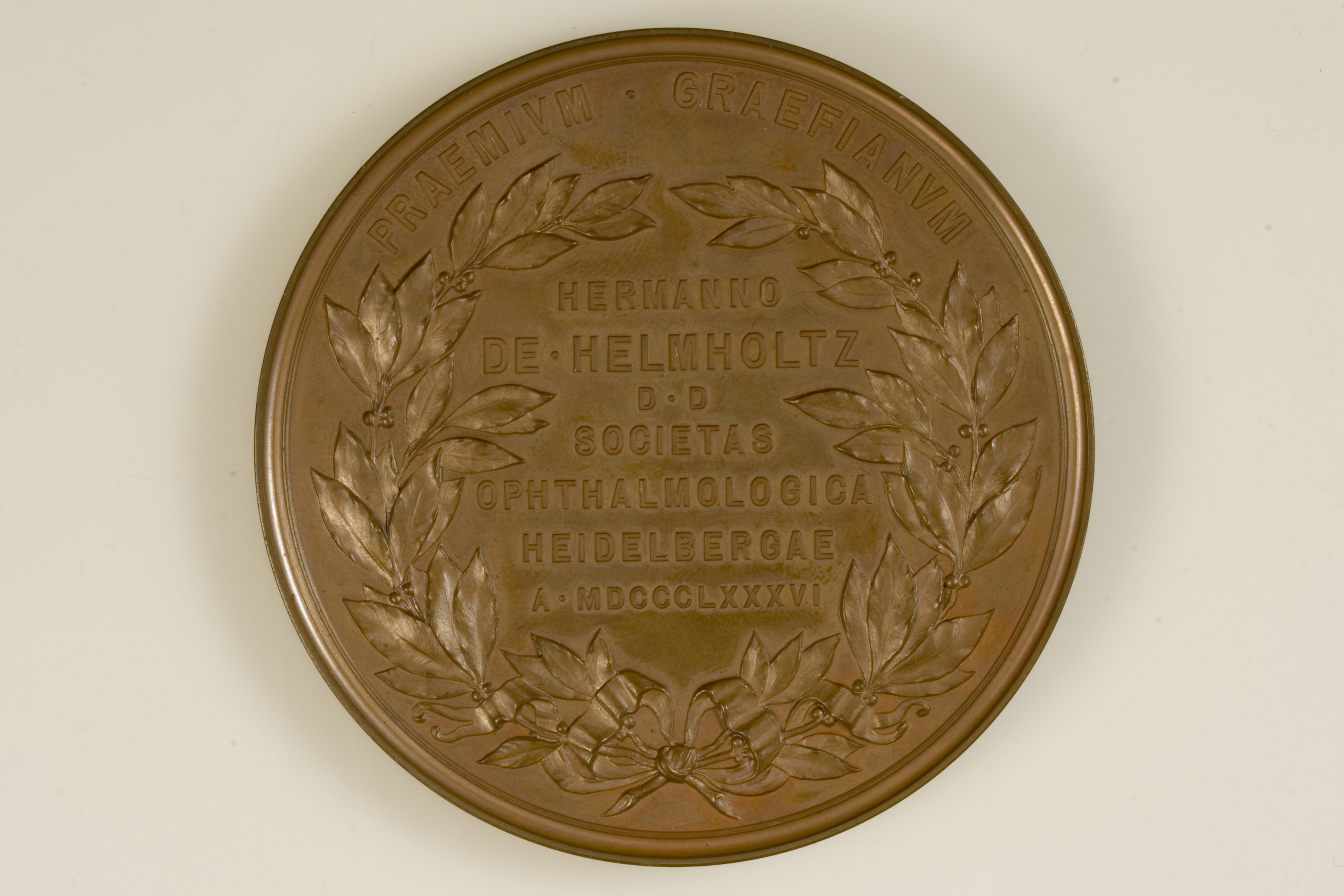 Revers einer bronzenen Ausgabe der Graefe-Medaille, die 1886 Hermann von Helmholtz in Gold verliehen wurde.